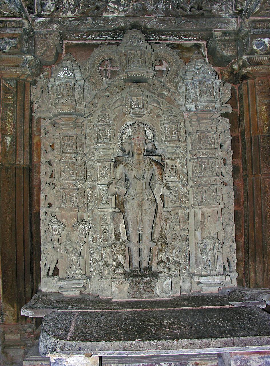 India-5650